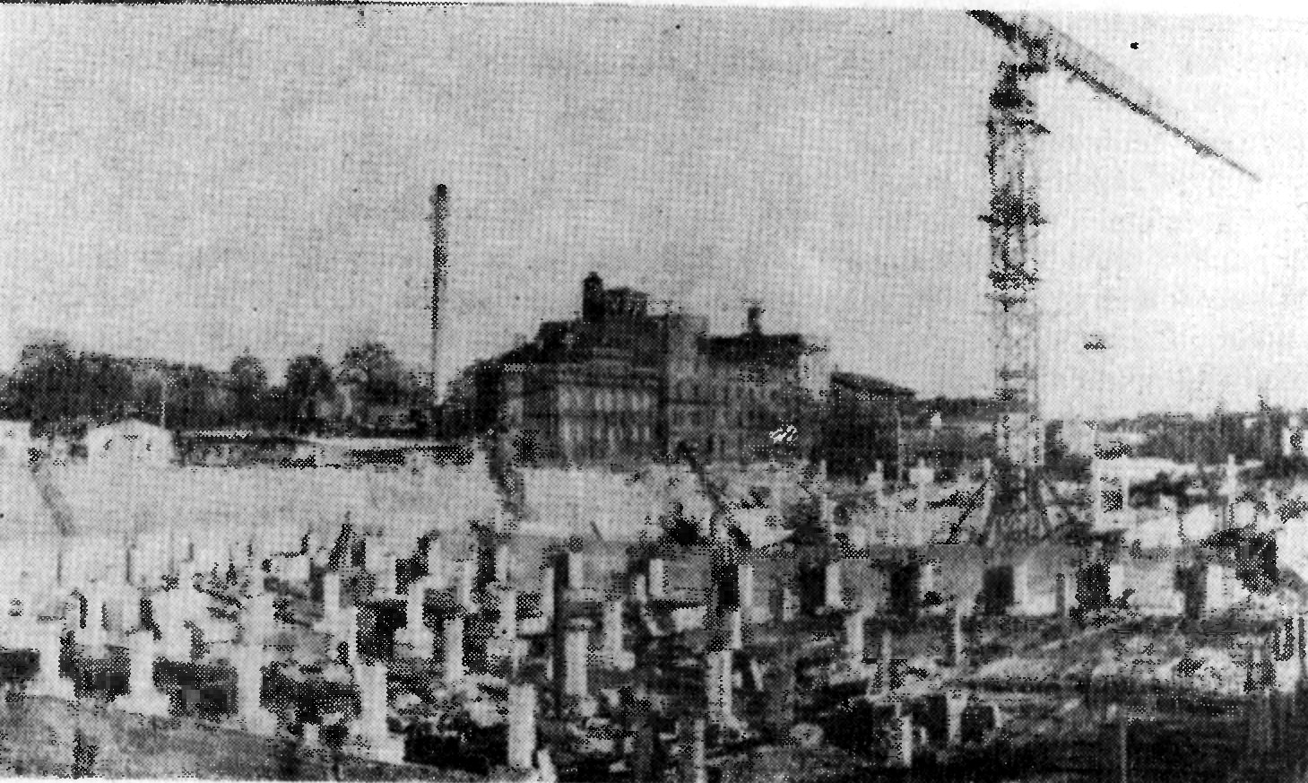 Hotel Orbis-Poznań. luty 1975 - plac budowy. W tle Browar Huggerów.